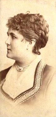 Blaha Lujza kb. 35 évesen. Ellinger Ede fotója Hungarian Theatre Museum and Institute LocationBudapestCoordinates47° 29′ 51.75″ N, 19° 01′ 47.32″ E Established1952Web pageszinhaziintezet.huAuthority control : Q1226166 VIAF: 152589477 ISNI: 0000 0001 0945 5202 BNF: 123022856 NKC: mzk2010513258 institution QS:P195,Q1226166